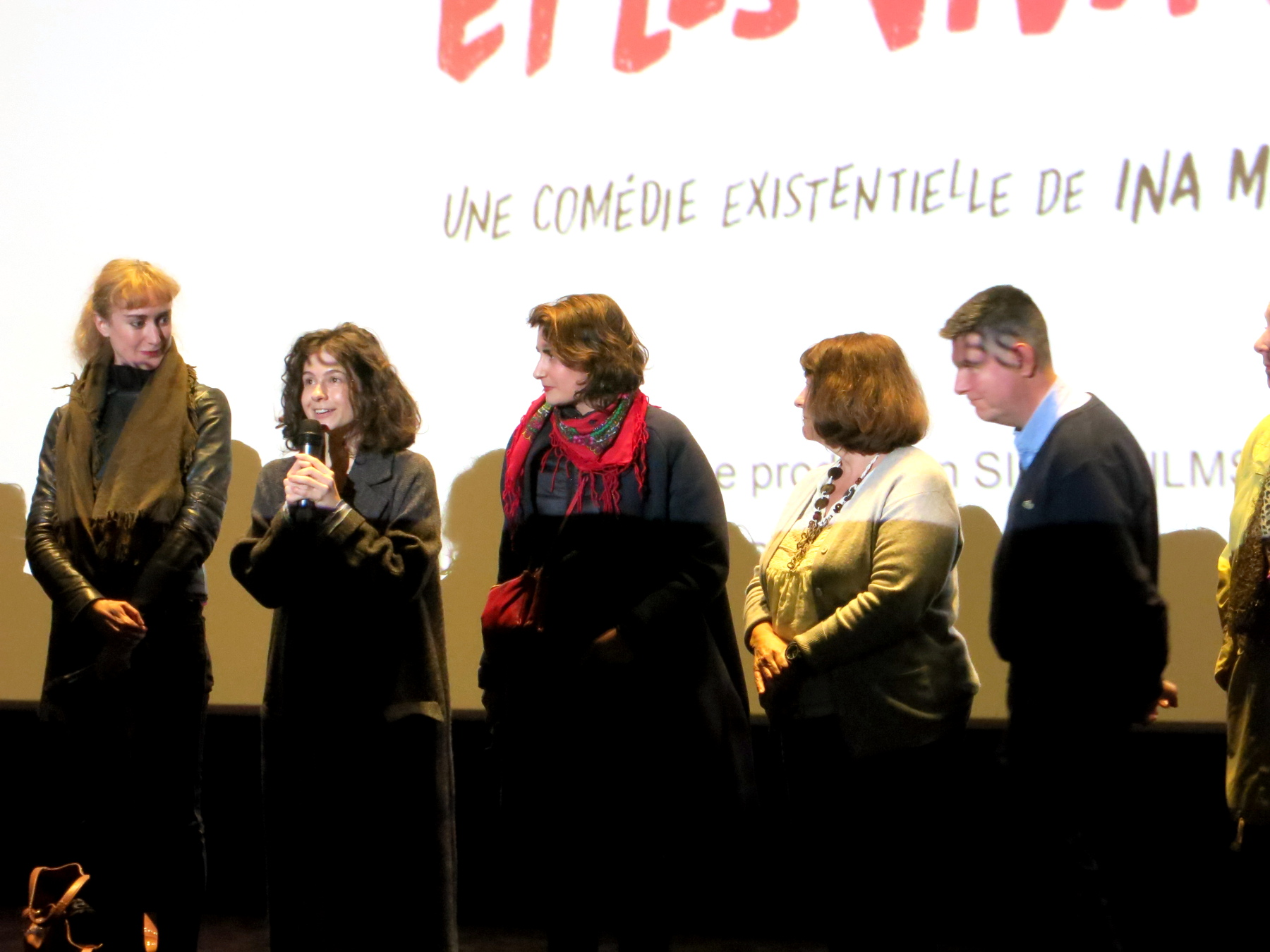 Présentation du film Solange et les vivants aux "crowdfunders", avec l'auteure et actrice principale Ina Mihalache, au cinéma étoile Lilas, à Paris.